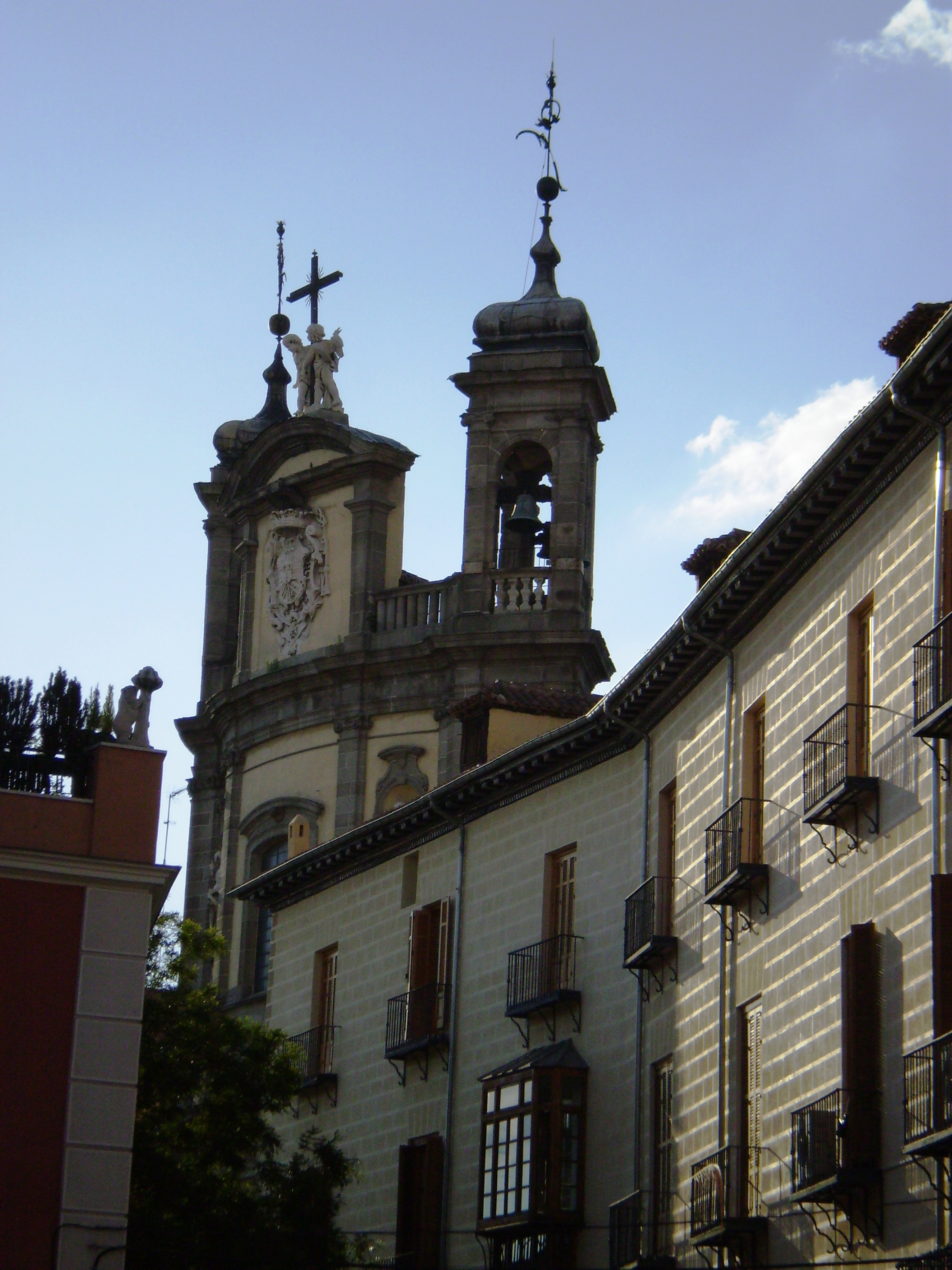 Basílica de San Miguel y Palacio Arzobispal de Madrid, España